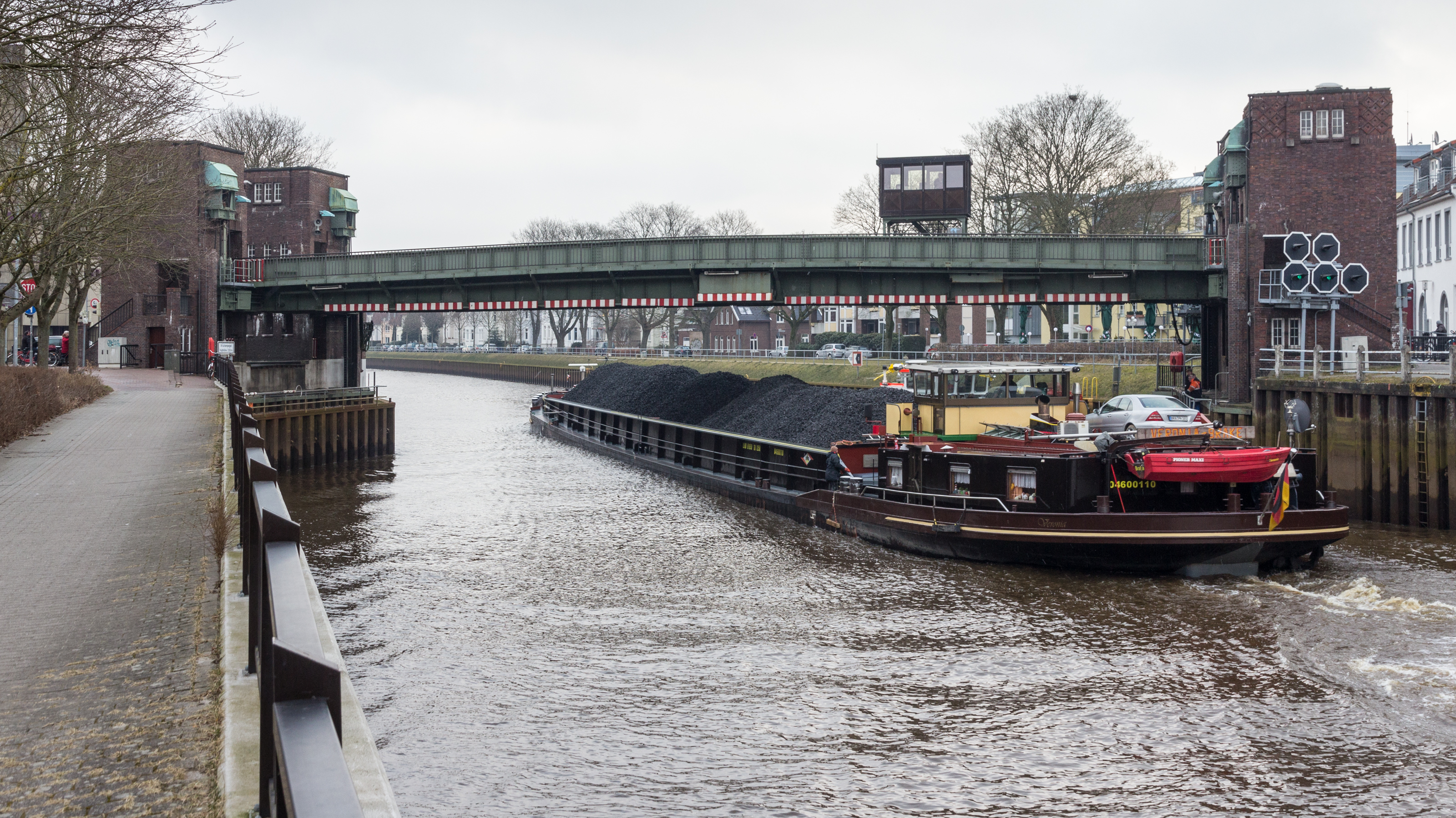 MS Veronia passiert die gehobene Cäcilienbrücke in Oldenburg